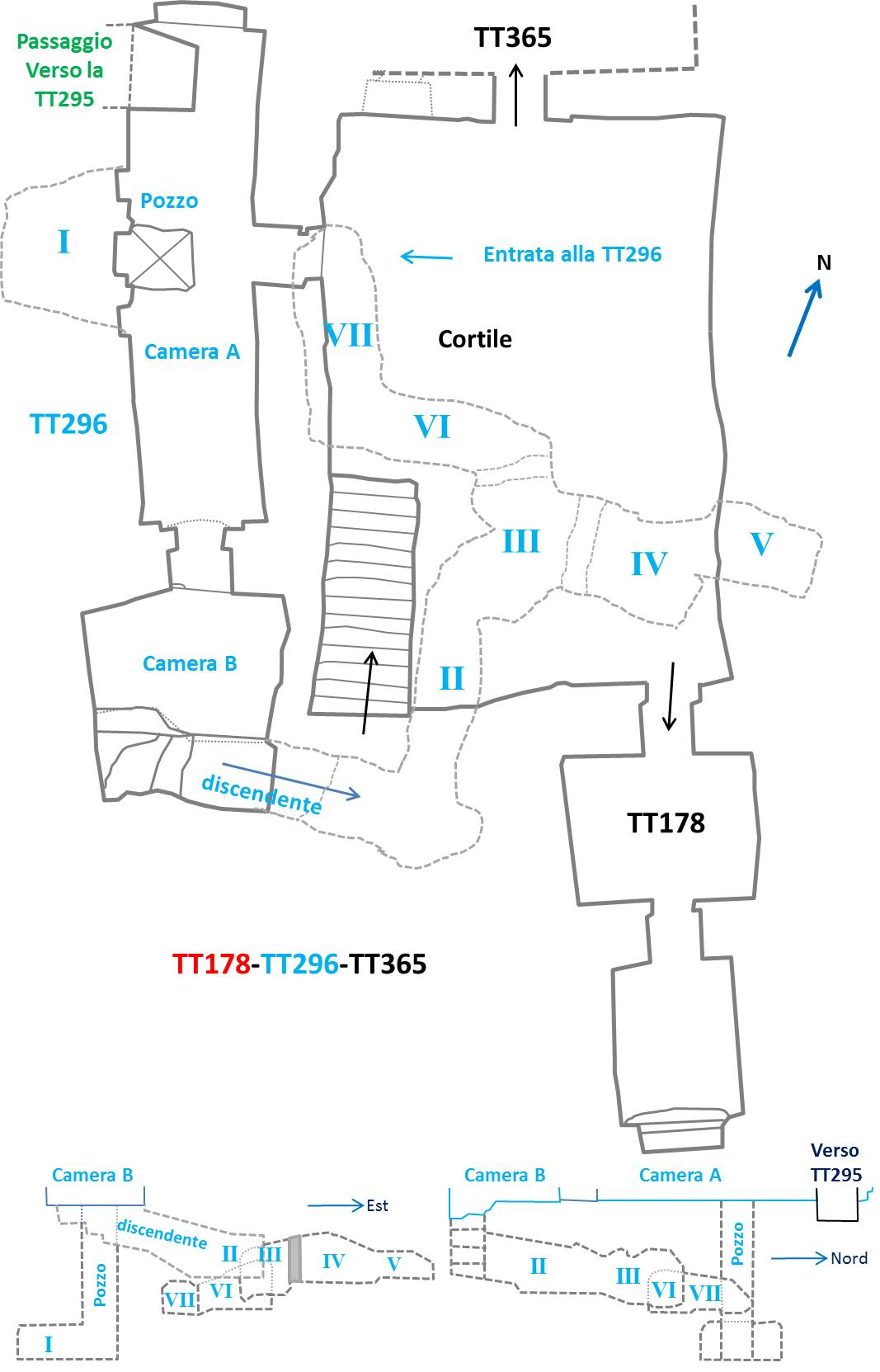 Planimetria schematica dell'appartamento sotterraneo della tomba TT296